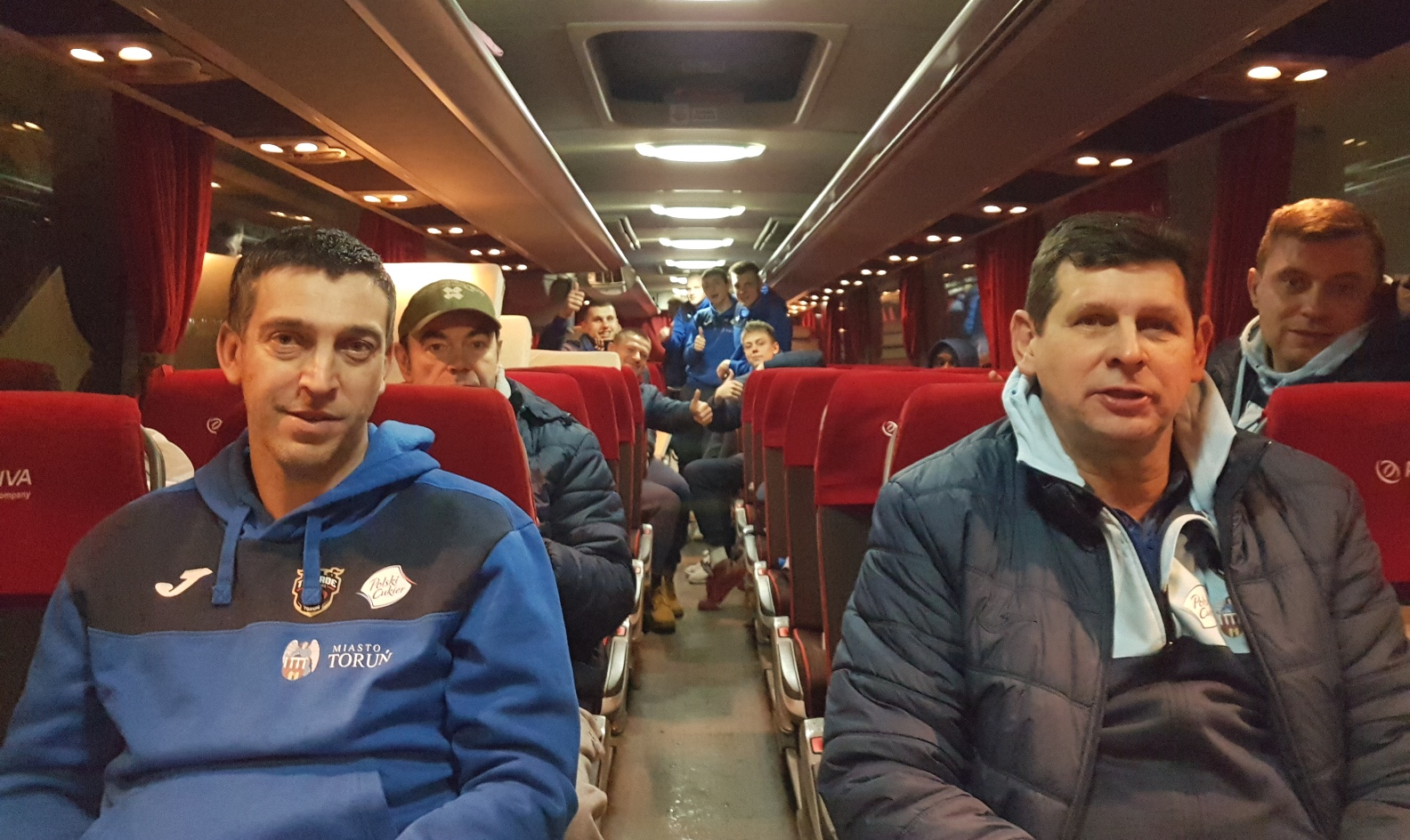 Stargard. Polski Cukier Toruń